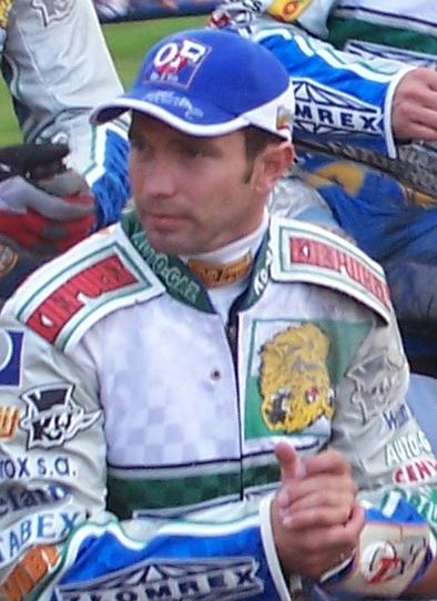 Sebastian Ułamek, żużlowiec (speedway rider)